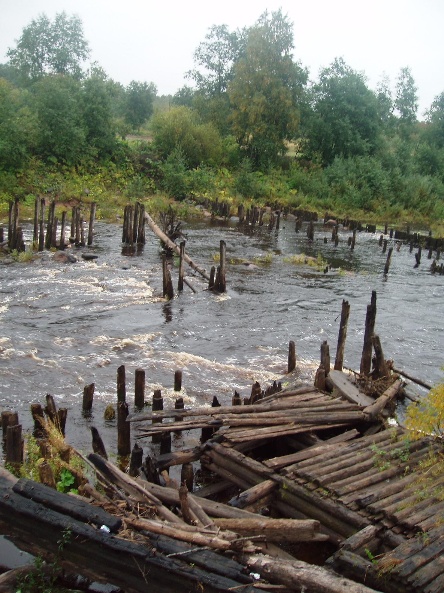 Развалины шлюза Тихвинской водной системы на окраине Тихвина